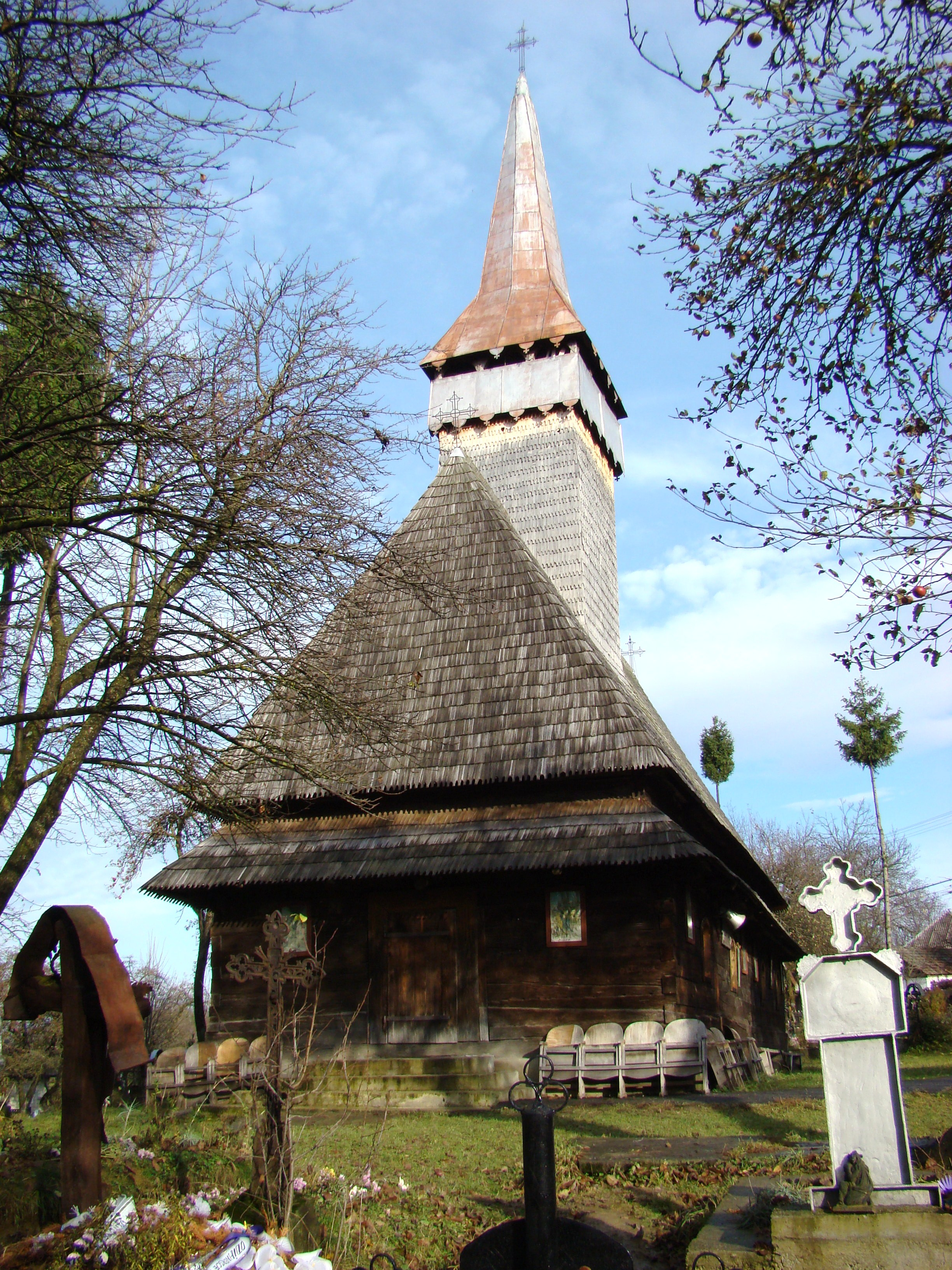 Biserica de lemn din Hoteni, județul Maramureș